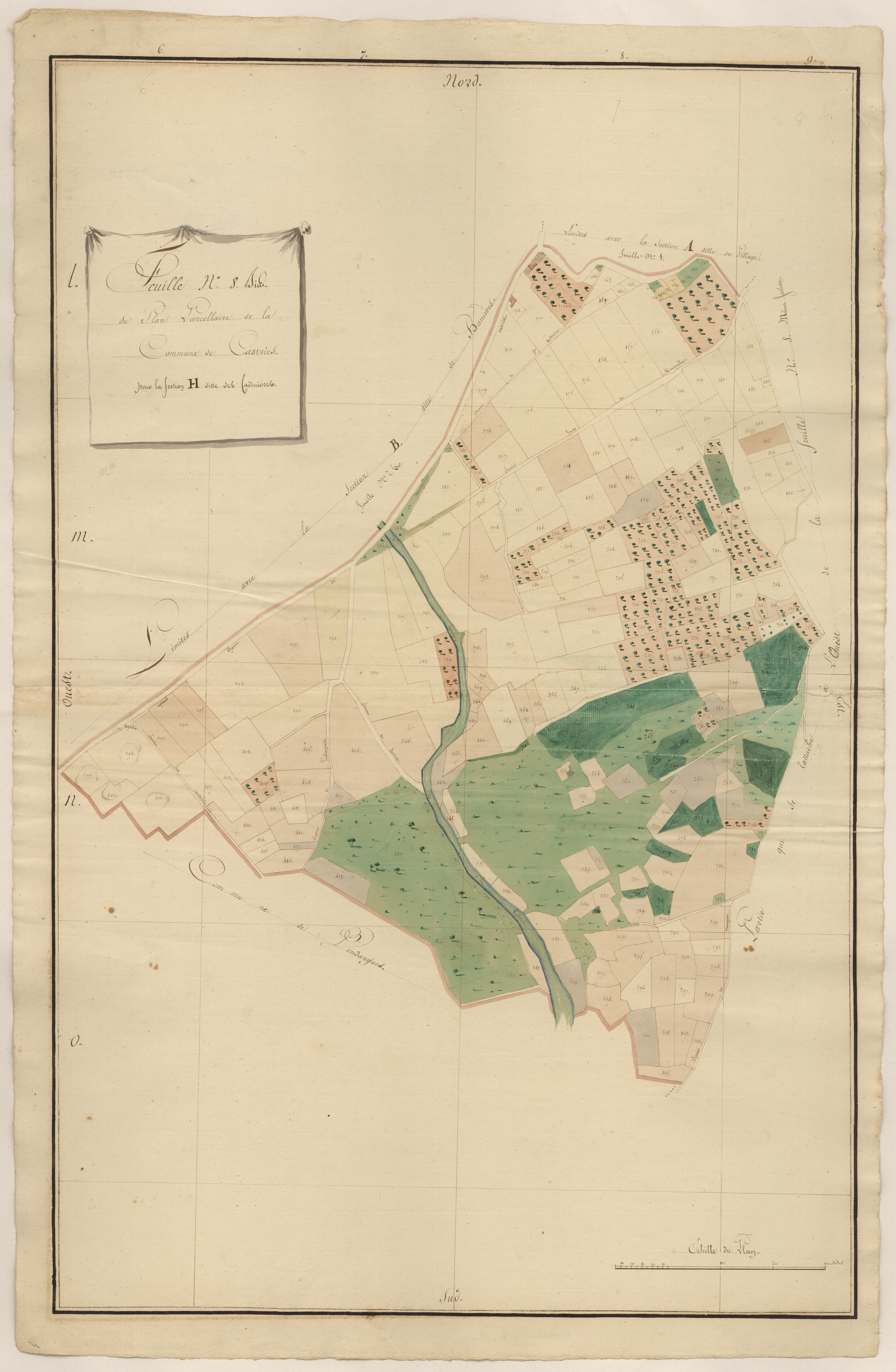 Saint-Geniès-des-Mourgues. - Casdastre napoléonien : plan de la section B du Centre du Plan